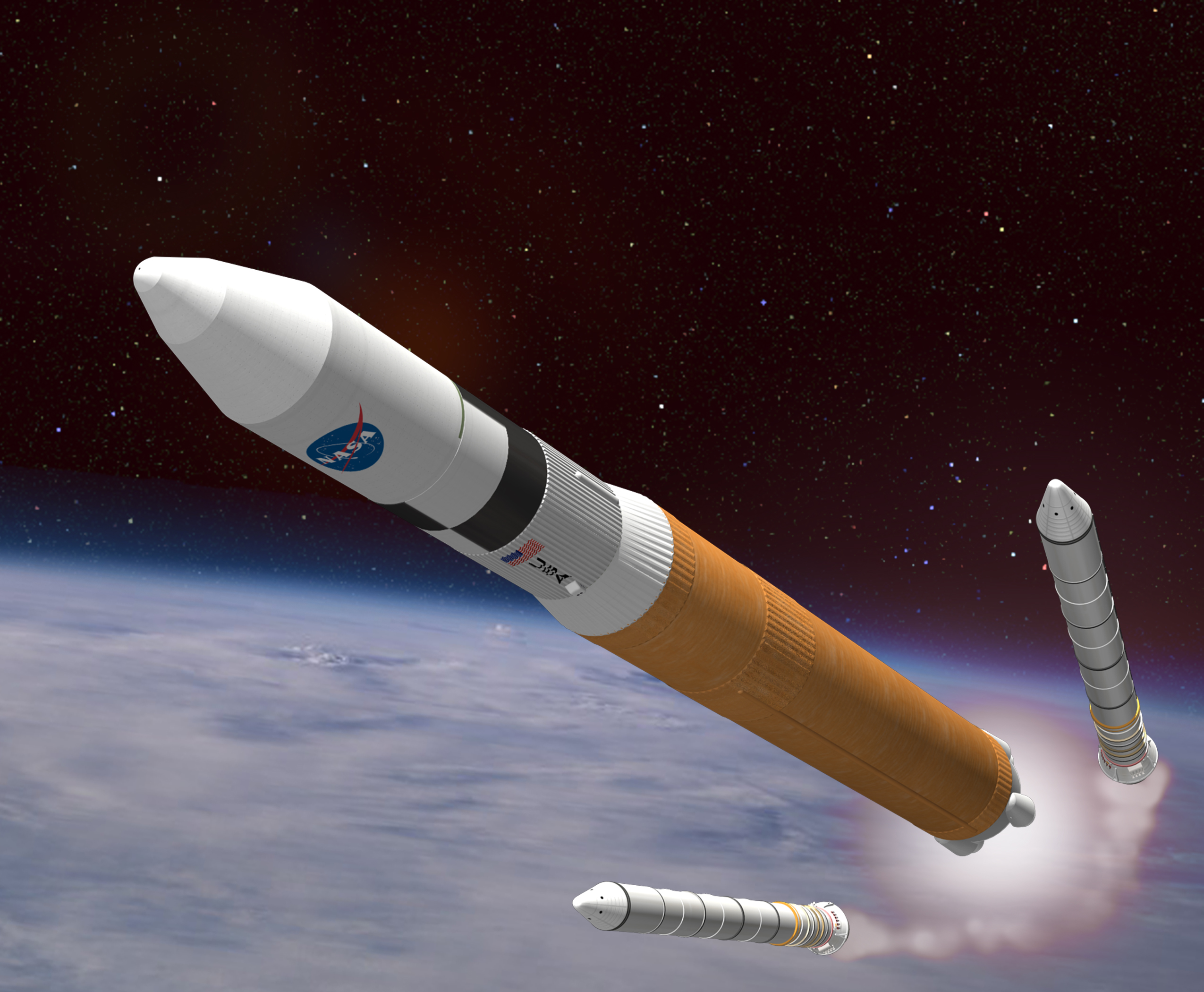 Ares V launch (concept image)